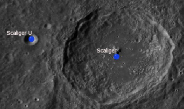 Cráter lunar Scaliger. Cráteres satélite. (Imagen LRO)